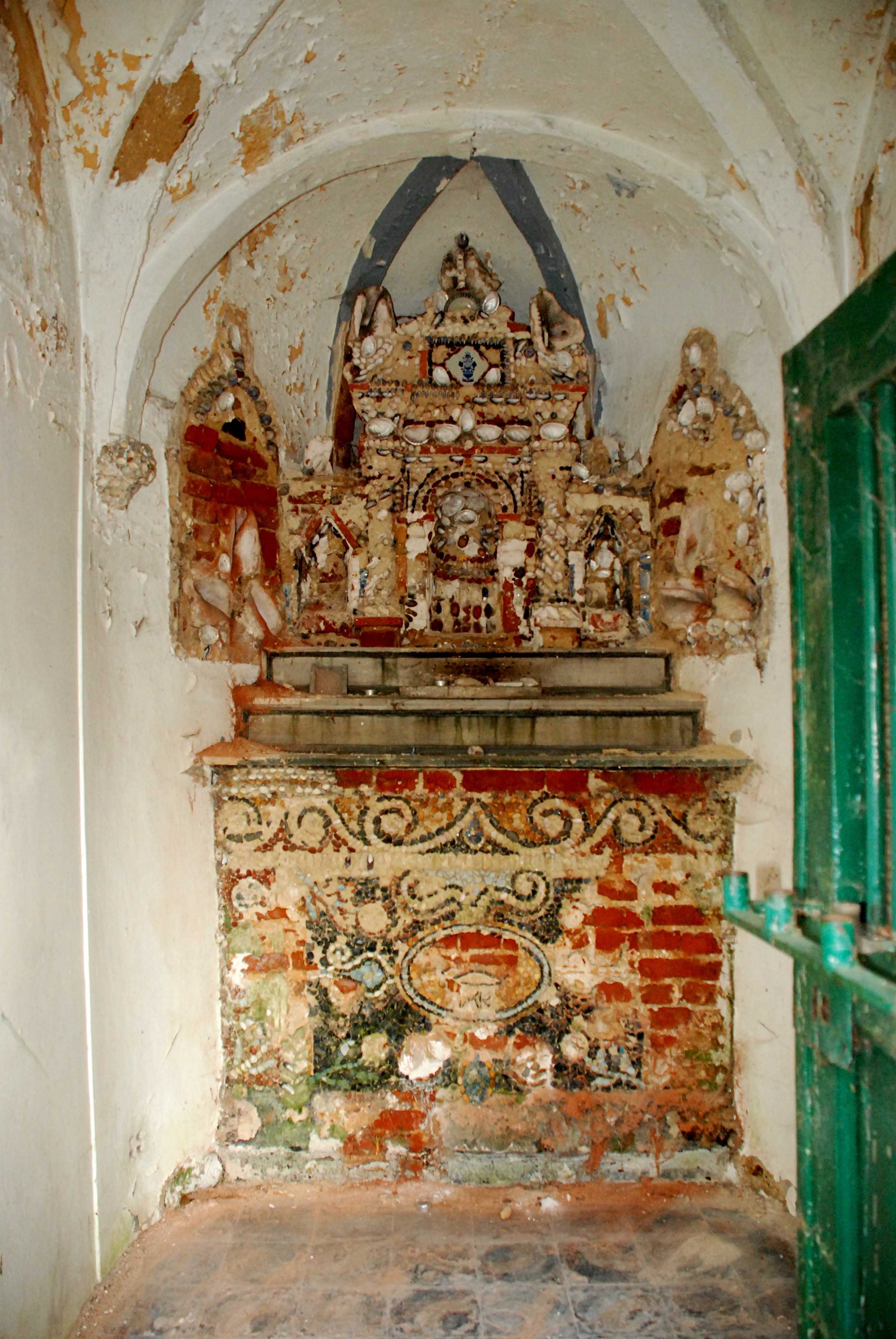 Belgique - Brabant wallon - Limal - Chapelle de Grimohaye